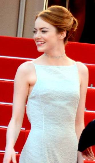 Pierre Lescure et Emma Stone au festival de Cannes